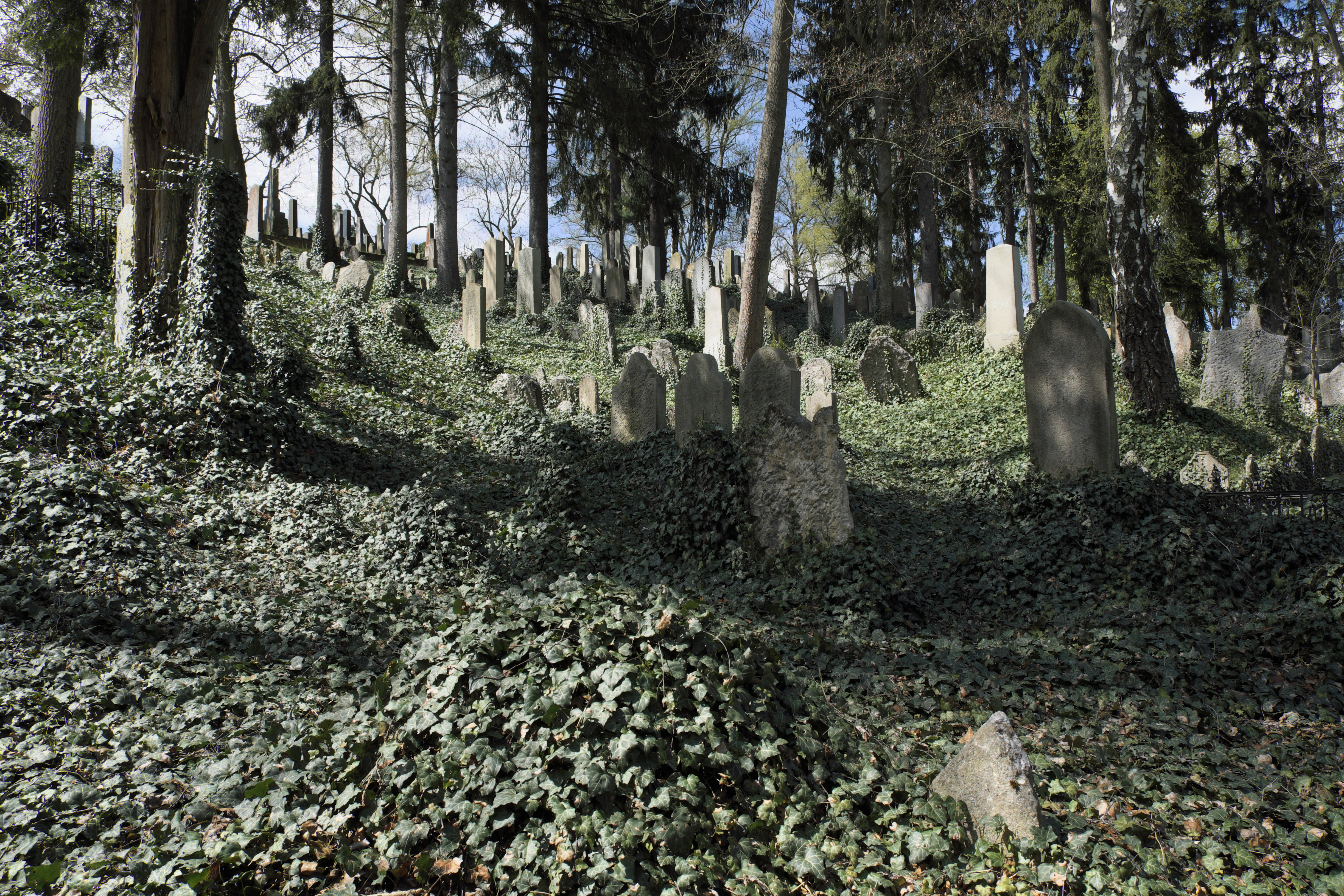 Jüdischer Friedhof in Třebíč in der Region Hochland (Kraj Vysočina, Tschechien)